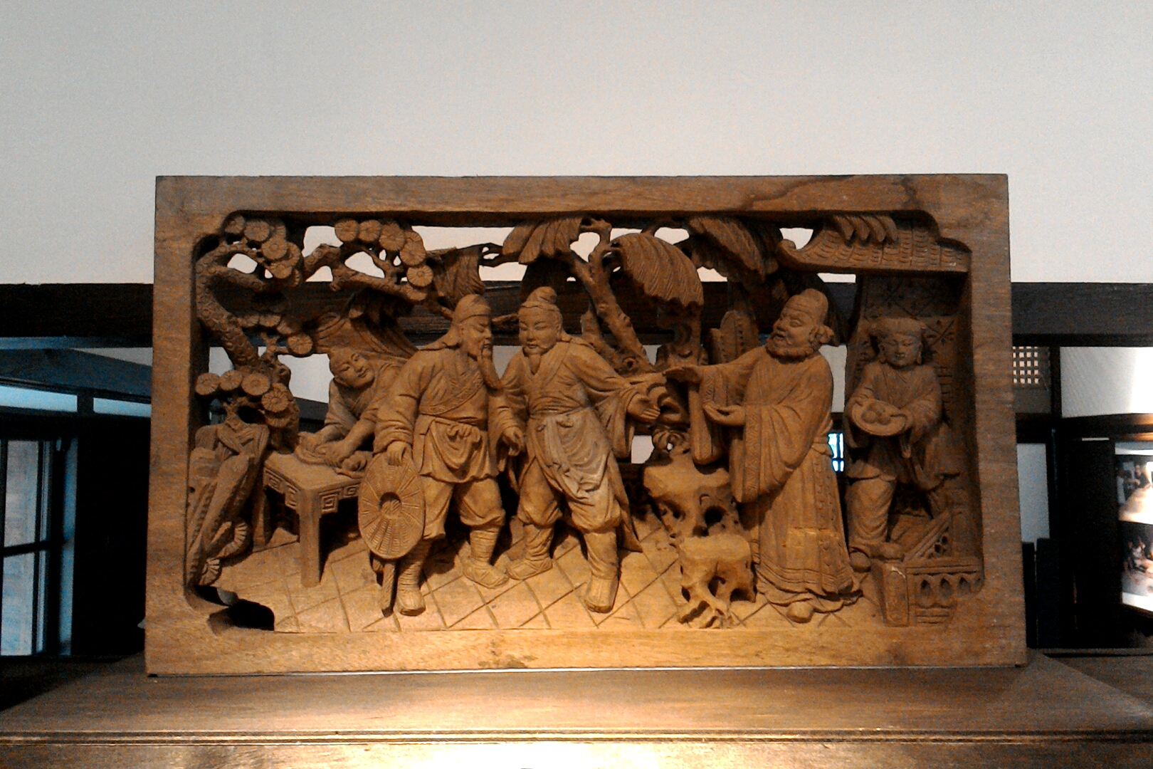 藝師館內的「桃園三結義」木雕,桃園市大溪區興和里